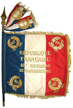 flag of the 40th regiment of transmissions